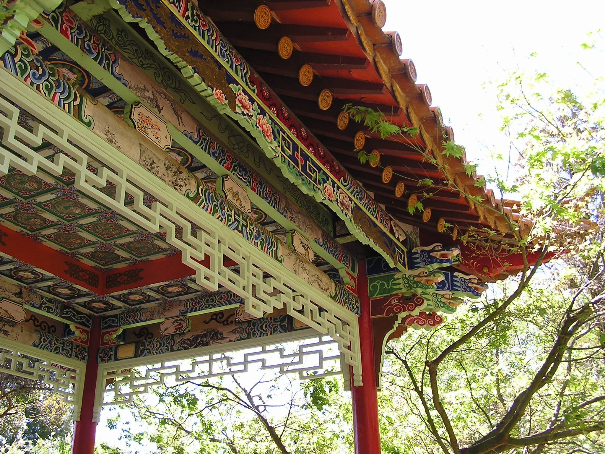 Chinese pavilion at Wagga Wagga Botanic Gardens